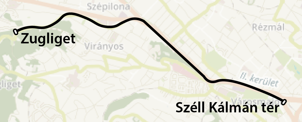 A Zugligetbe tervezett trolibusz nyomvonala This map may be incomplete, and may contain errors. Don't rely solely on it for navigation.